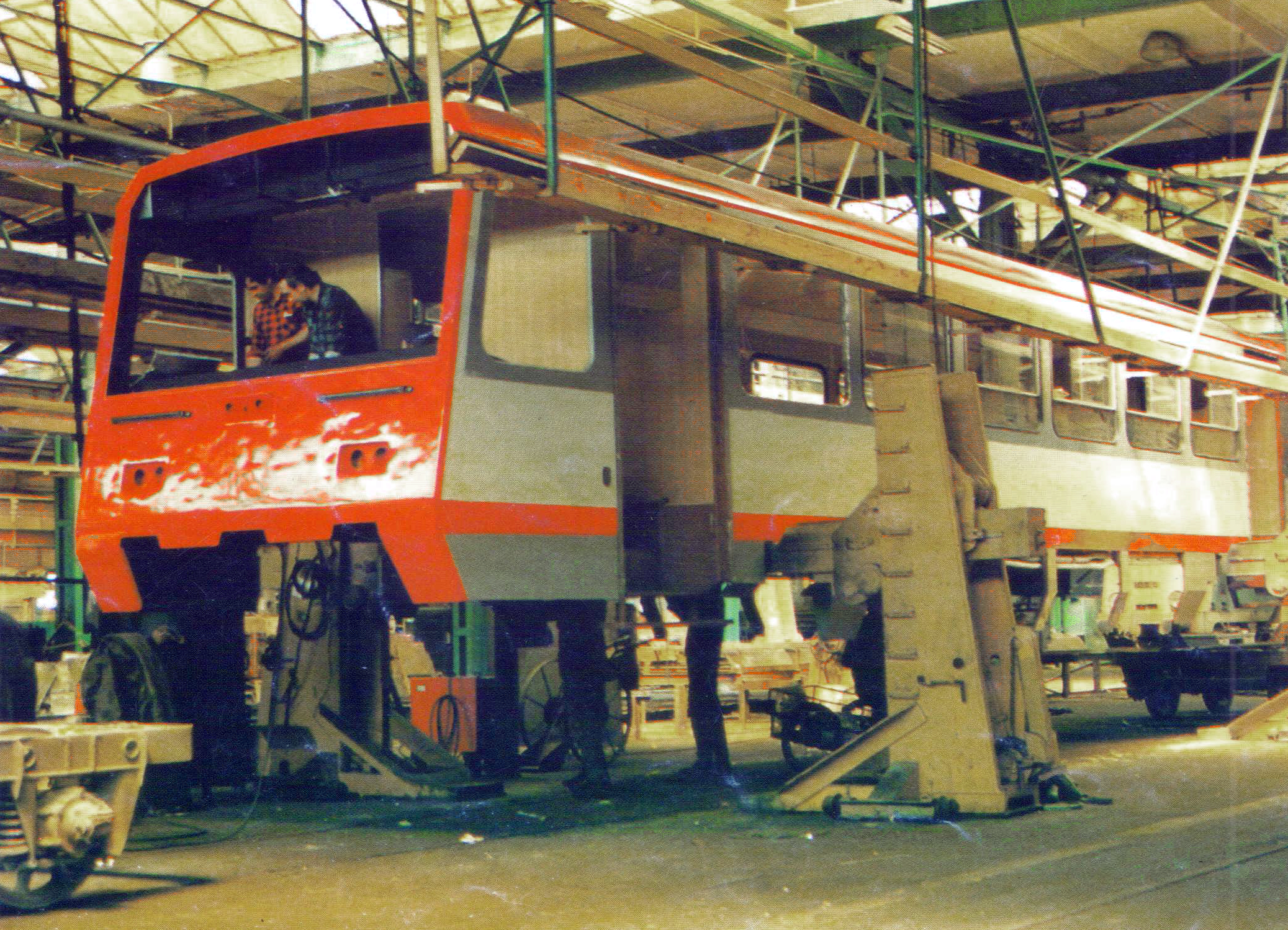 Wagon SA101-002 podczas montażu nadwozia w hali ZNTK Poznań.